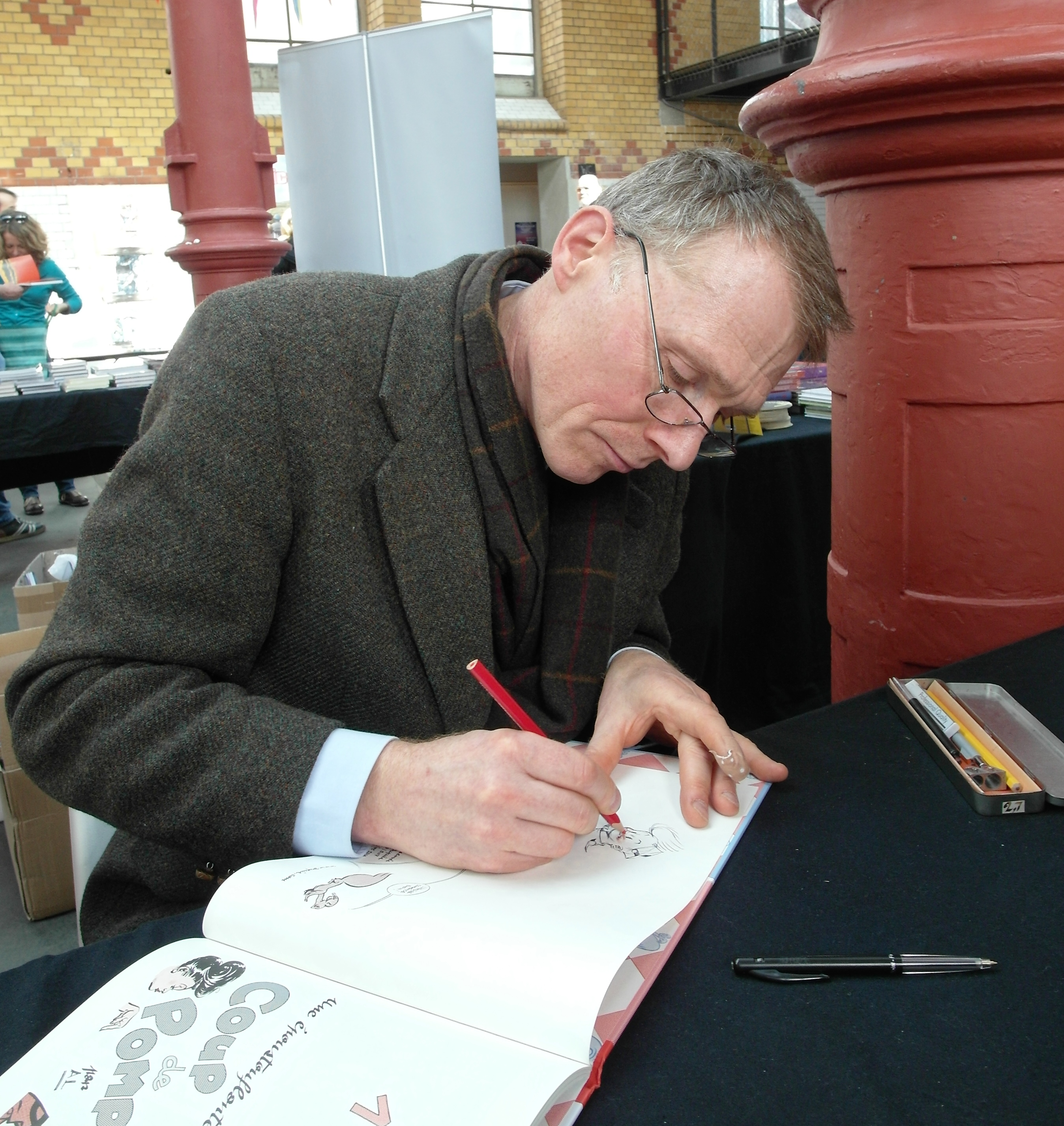 Alec Severin, auteur belge de bande dessinée, dessine à la Comiciade 2018 à Aix-la-Chapelle